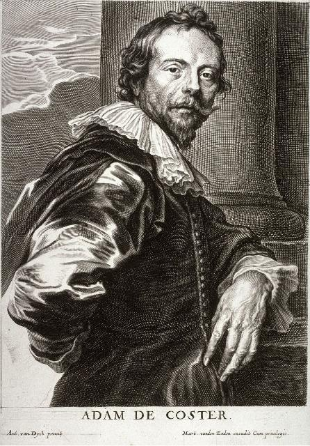 Portrait of Adam de Coster (1586-1643)